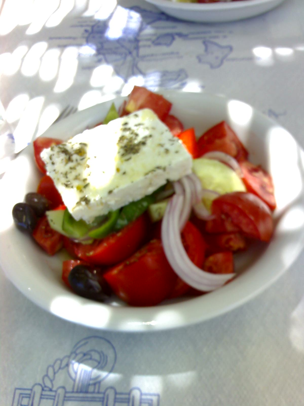 Un plat d'amanida grega.